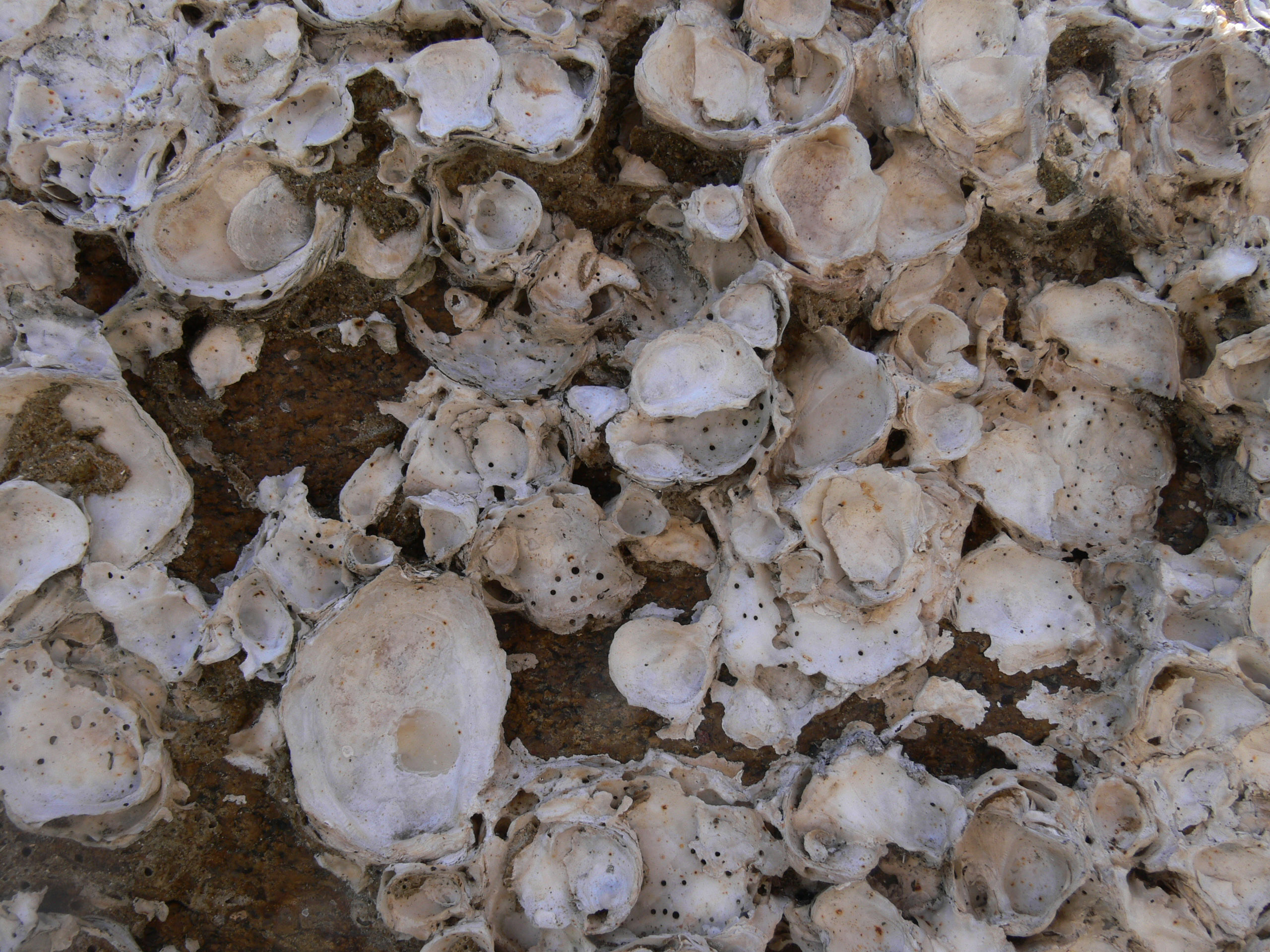 L'huître adapte la forme de sa coquille à celle de ses voisines ou de l'environnement rocheux; Bretagne sud (Baie de Quiberon)